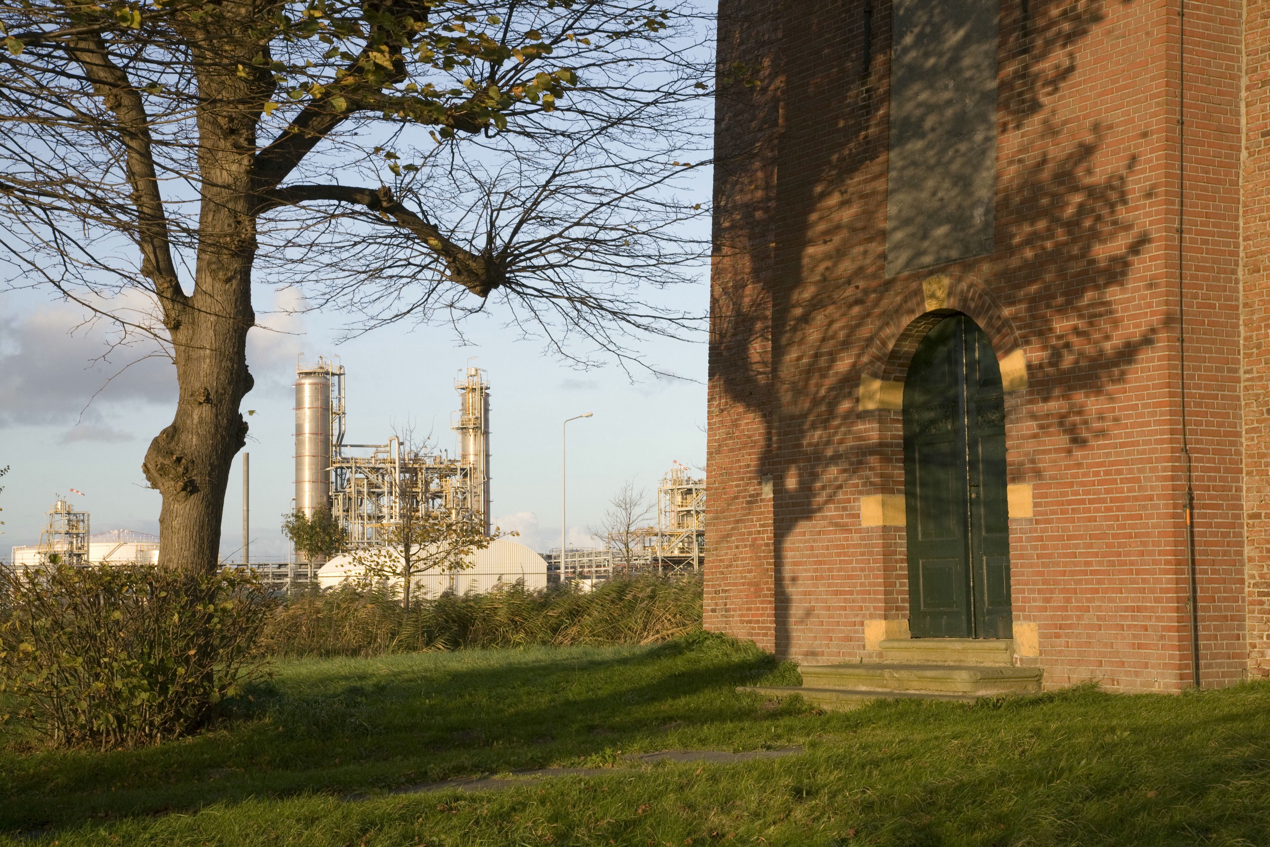 Nederlands Hervormde Kerk: Westgevel Toren met Ingangspartij en op de achtergrond het industriegebied rond Delfzijl (opmerking: Publicatie: TRAP Appingedam en Delfzijl (Cultuur Historische Routes in Nederland - 59))